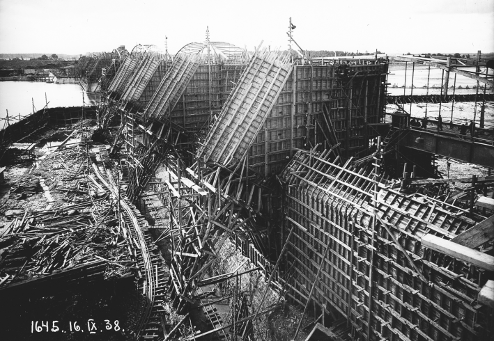 Ķeguma HES celtniecība 1937.gads